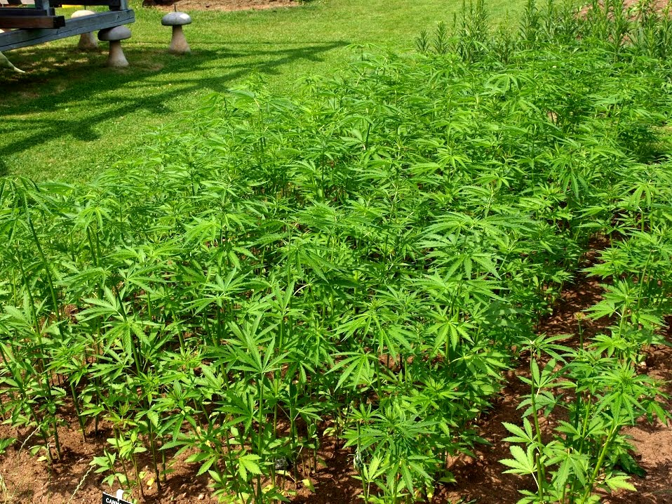 Konopí